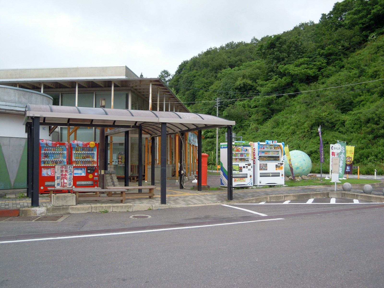 岩手県久慈市にあるJRバス東北の陸中山形駅。奥の建物は乗車券等を販売している道の駅白樺の村やまがた。